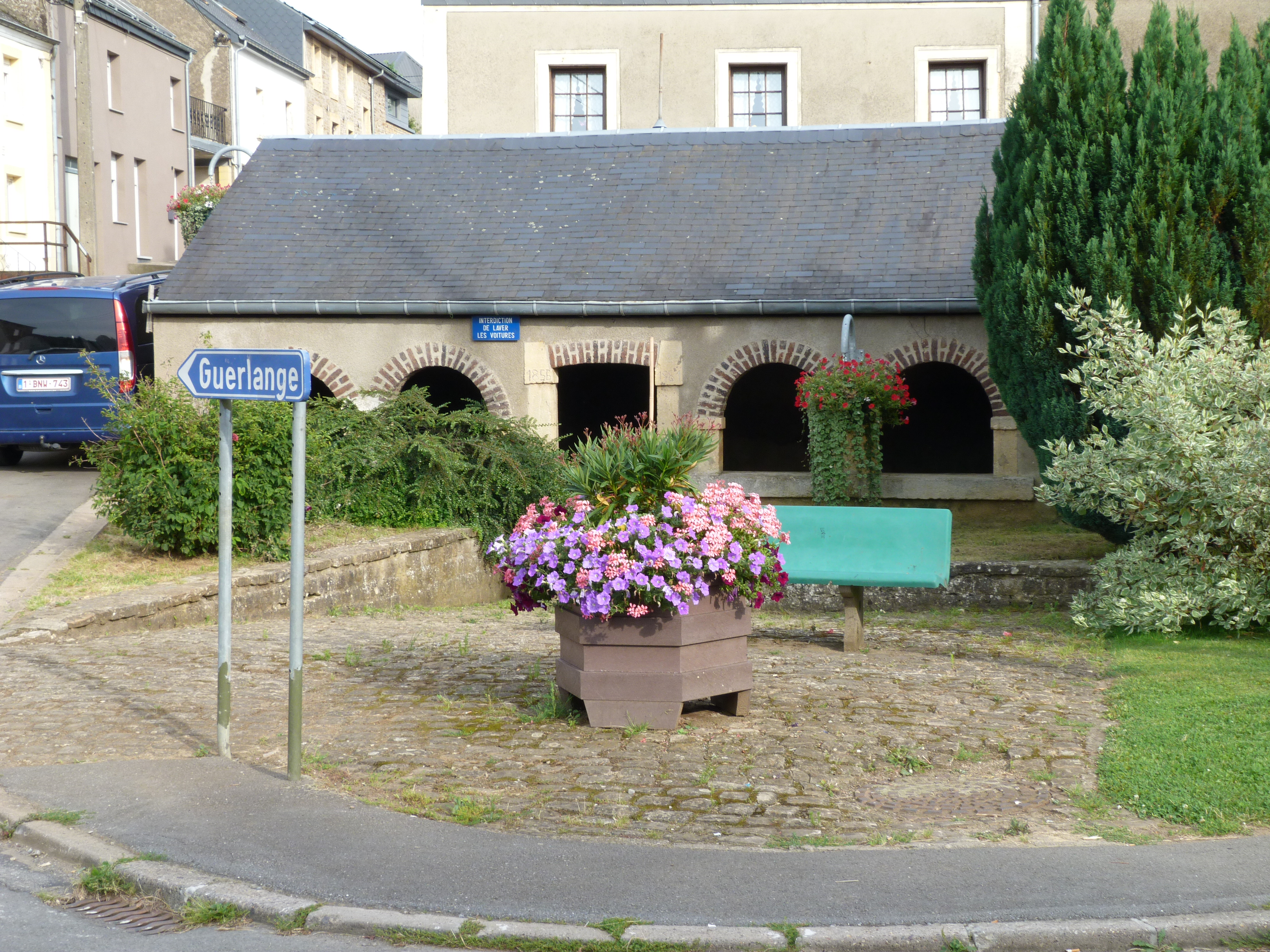 Source au lavoir de Longeau